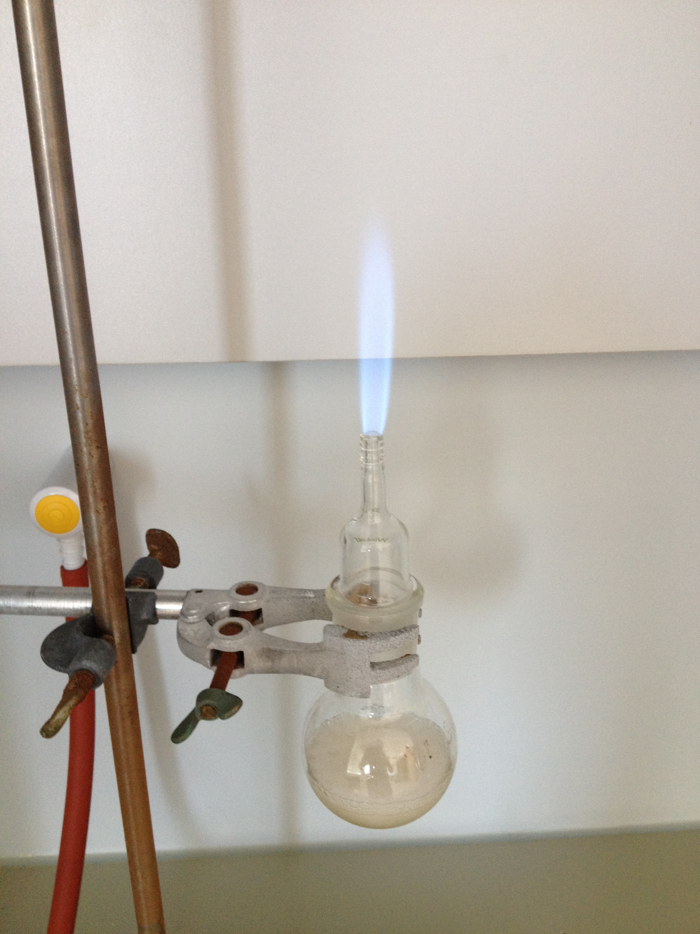 Bei der Dehydratisierung von Ameisensäure mit konzentrierter Schwefelsäure entsteht giftiges Kohlenstoffmonoxid, welches sich entzünden lässt.